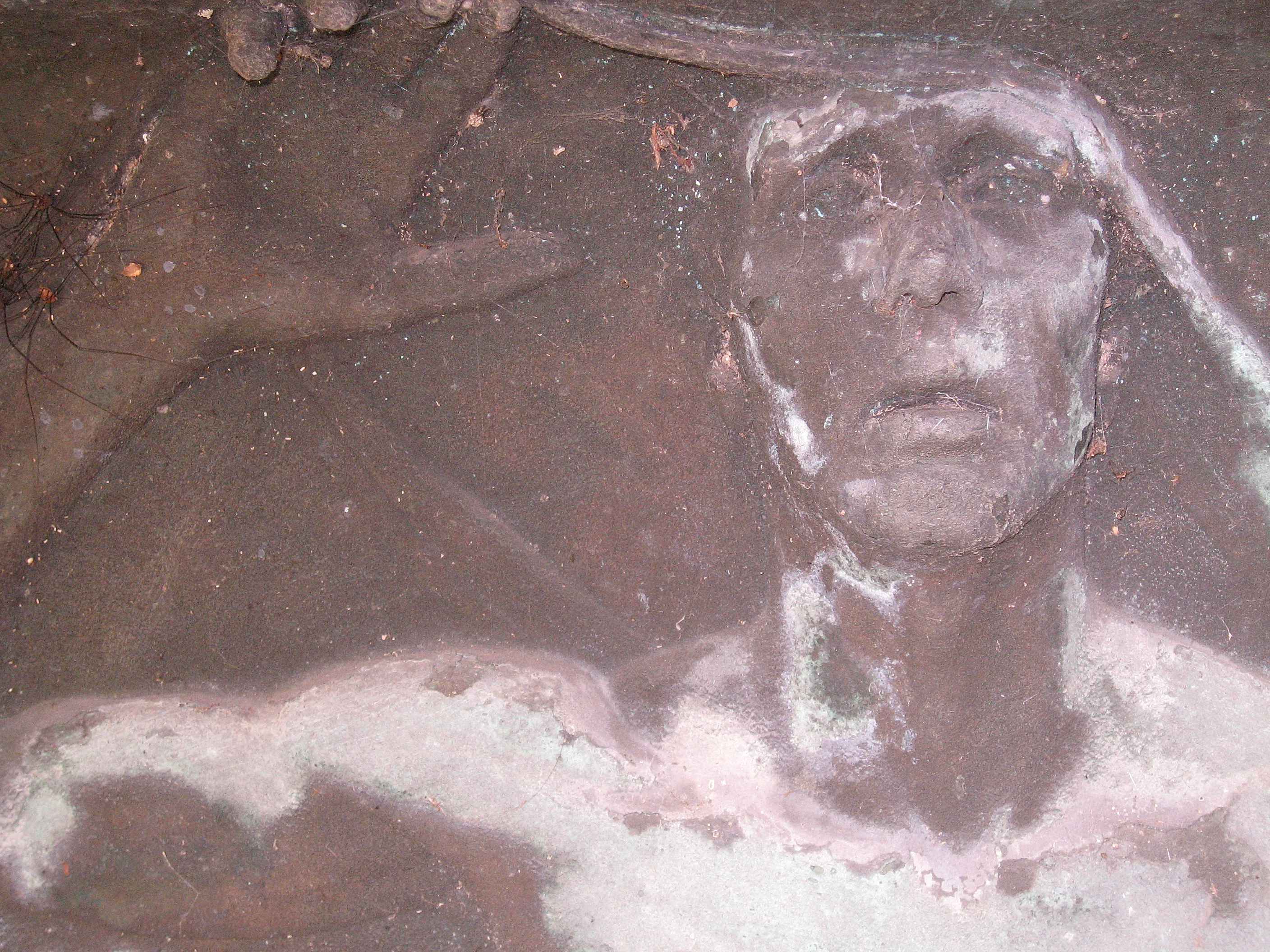 Dortmund, Innenstadt-Ost, Relief «Auferstehung» von Benno Elkan, 78 x 112 cm, signiert und datiert, 1905. Grabmal Wilhelmine Hövel auf dem Ostenfriedhof in Dortmund, Detail